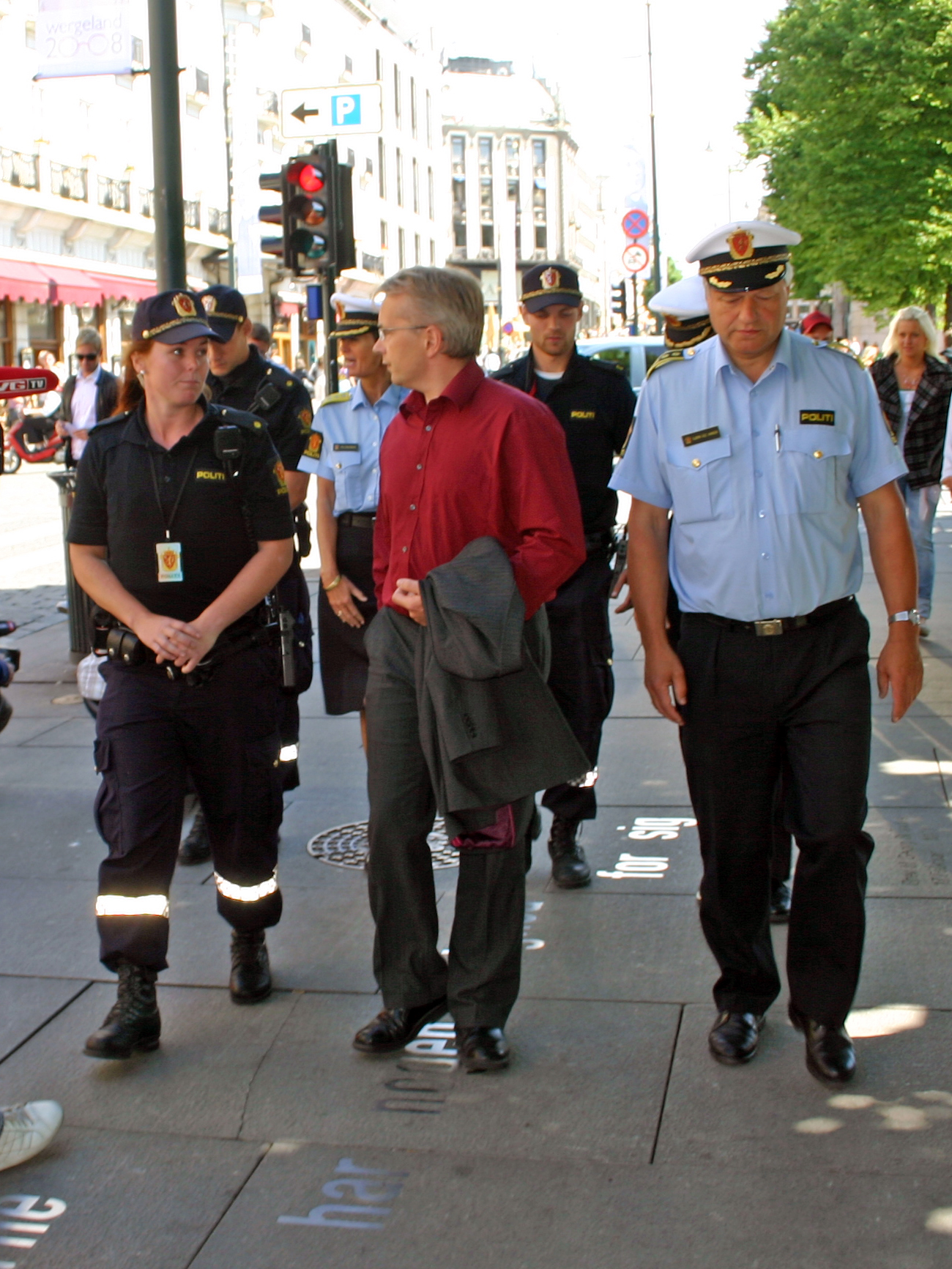 Justisminister Knut Storberget på Karl Johan sammen med politistudenter og politimesteren i Oslo.